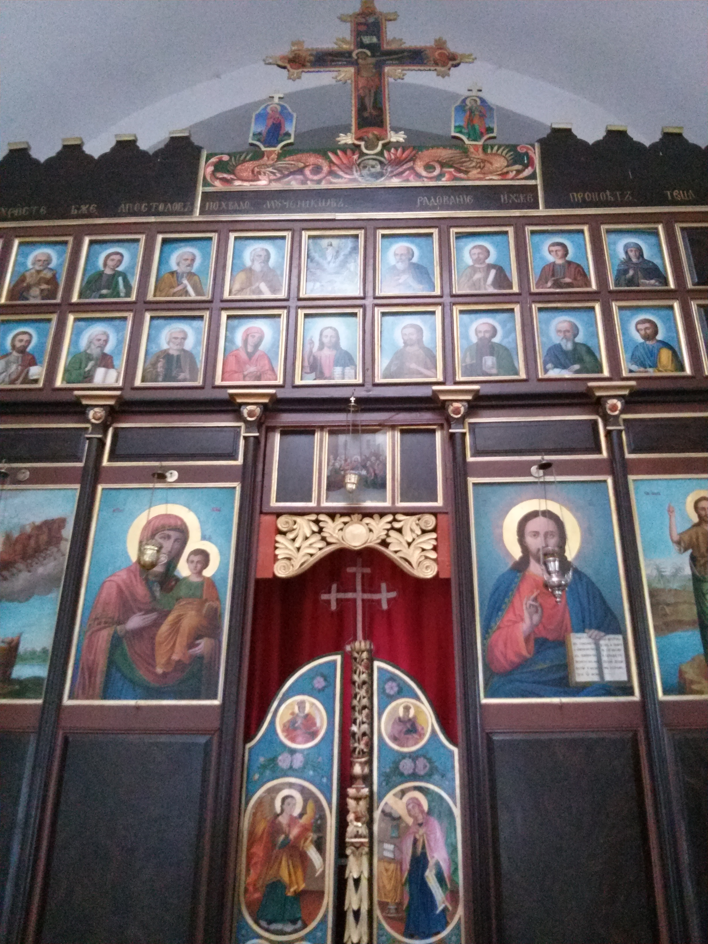 Srpski (latinica): Crkva Svetog Ilije, Vlasina Rid